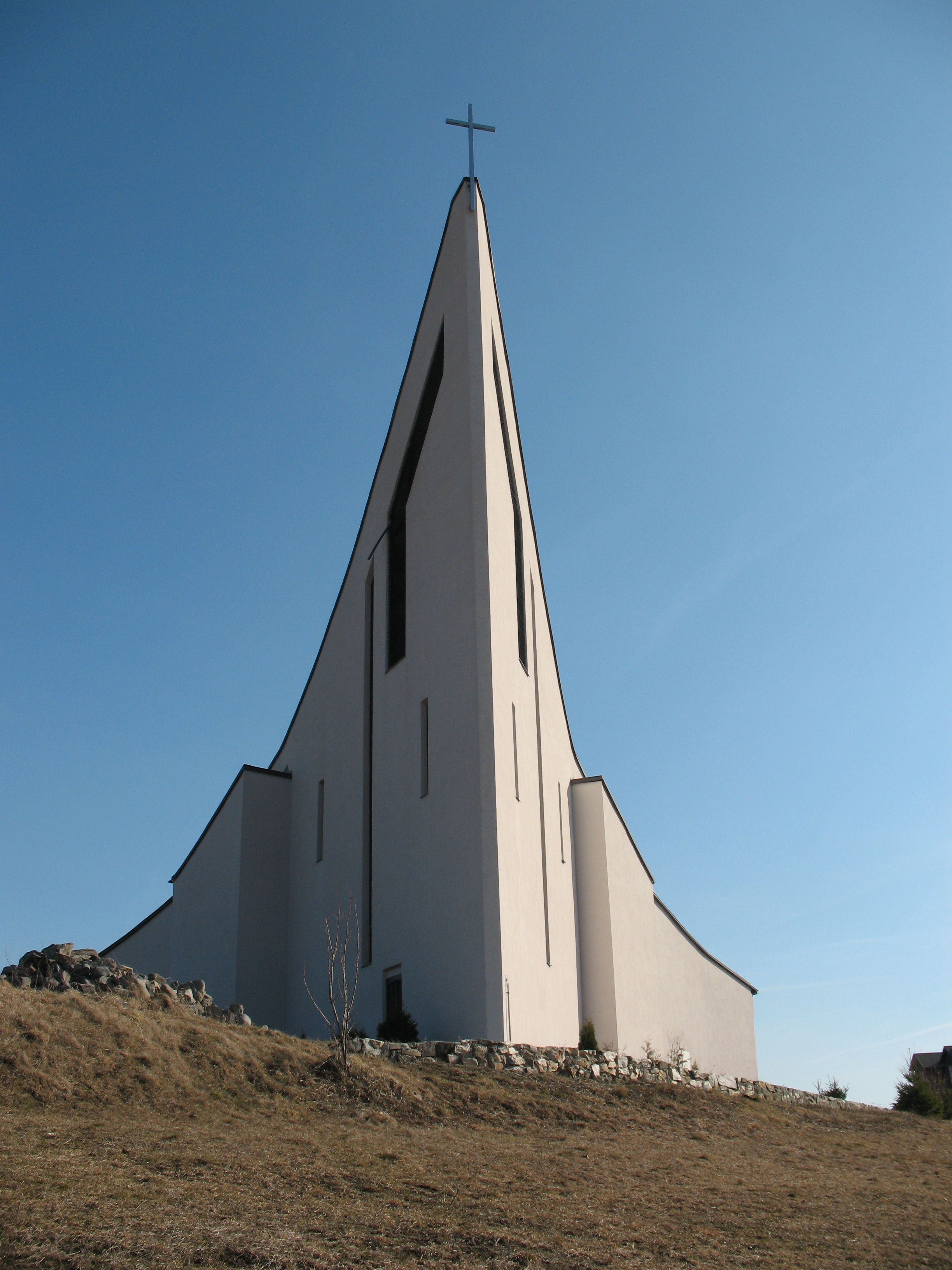 Kostol na Raticovom vrchu